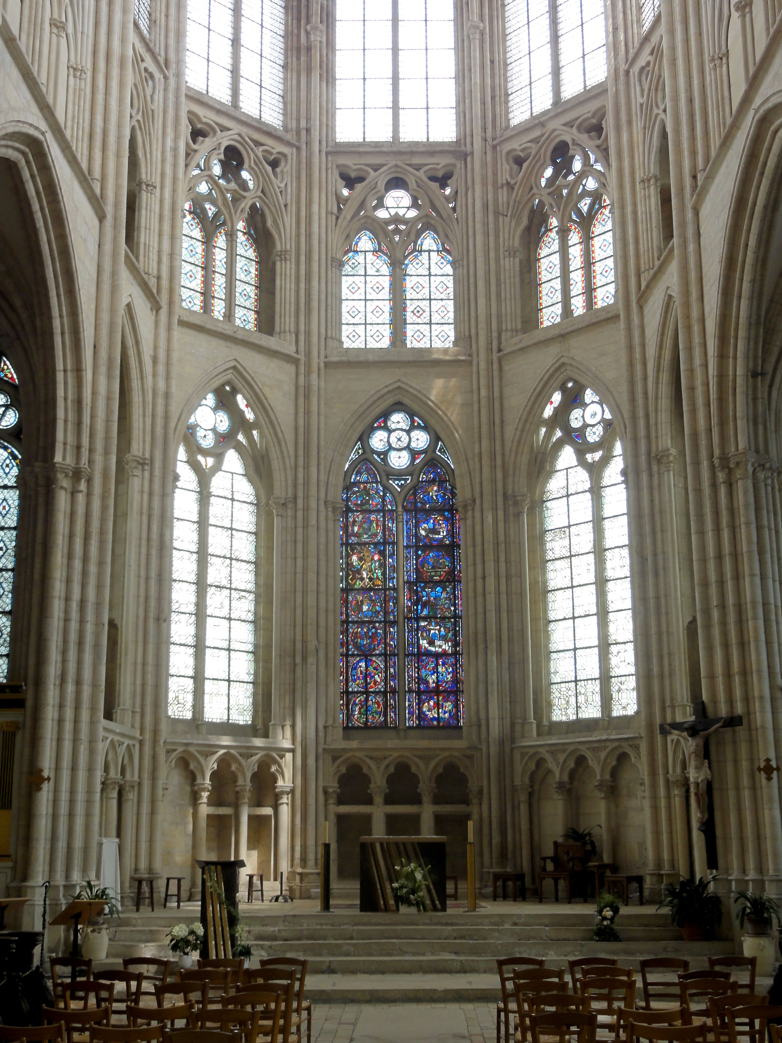 Abside, premier et deuxième niveau.